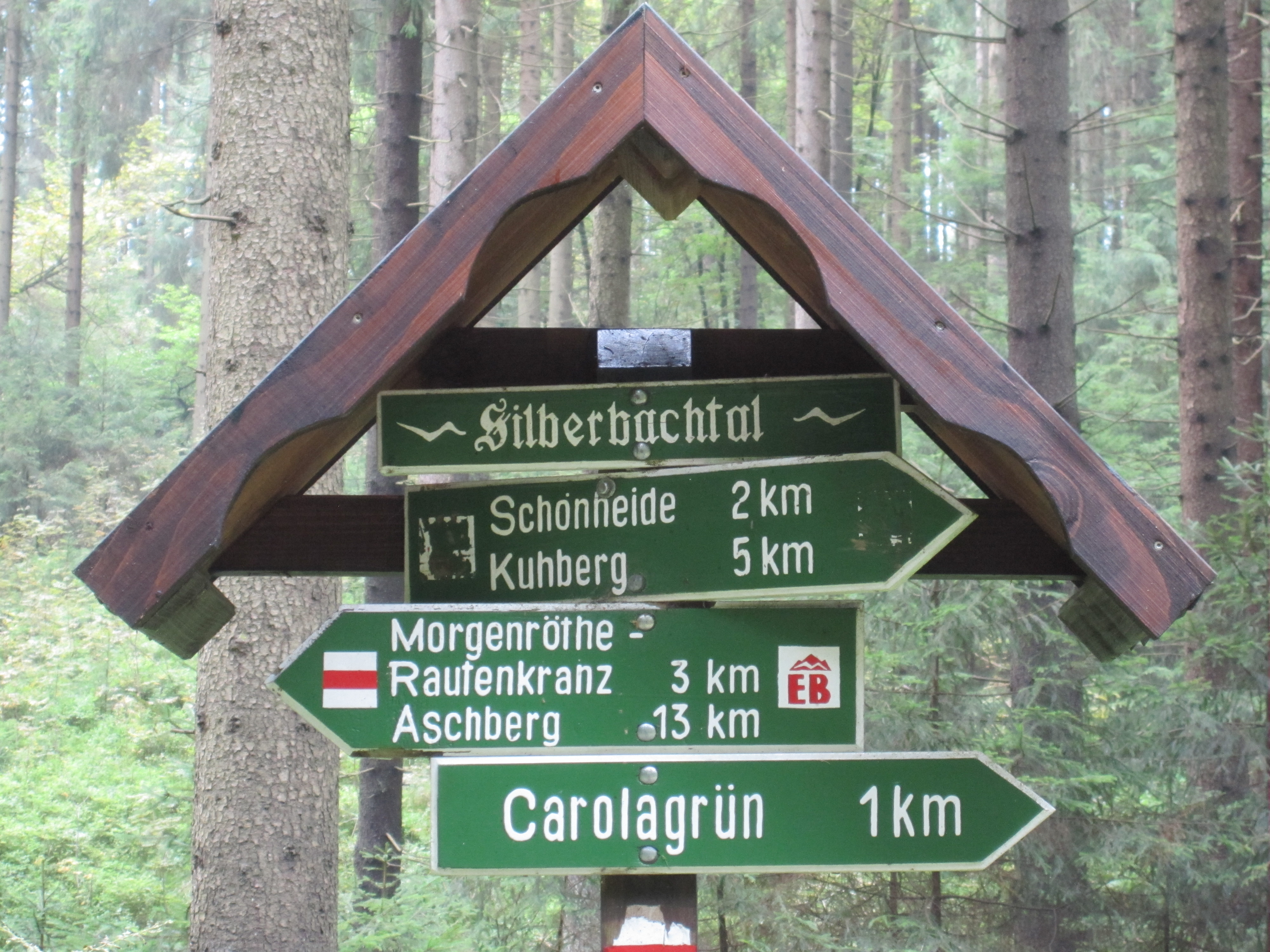 Der Silberbach, ein Forellengewässer dank guter Gewässerreinhaltung nach der Wiedervereinigung Deutschlands. Der Silberbach ist der längste der durch die südlich von Schönheide liegenden Wälder fließenden Bäche: Seine beiden Zuflüsse entspringen im Wald in etwa 725 m Höhe östlich des 767 m hohen Laubberges (auf Schönheider Gemeindegebiet östlich von Schnarrtanne). Nach etwa einem Kilometer östlicher Fließrichtung vereinigen sich die beiden Quellbäche und fließen durch den Wald nach Süden. In 651 m Höhe durchquert der Silberbach den Schönheider Stausee und fließt östlich des ehemaligen Fachkrankenhauses Carolagrün durch ein Wiesental, um den Rest seines Laufes in süd-östlicher Richtung ausschließlich durch Wald der Zwickauer Mulde zuzustreben, wo er gleich am Ortsausgang nördlich von Wilzschhaus in 585 m Höhe mündet. Bis auf ein kurzes Stück im Wiesental bei Carolagrün verläuft der Silberbach nur auf Schönheider Gebiet. Auf dem Wegweiser steht die Abkürzung EB für den europäischen Fernwanderweg Eisenach – Budapest.